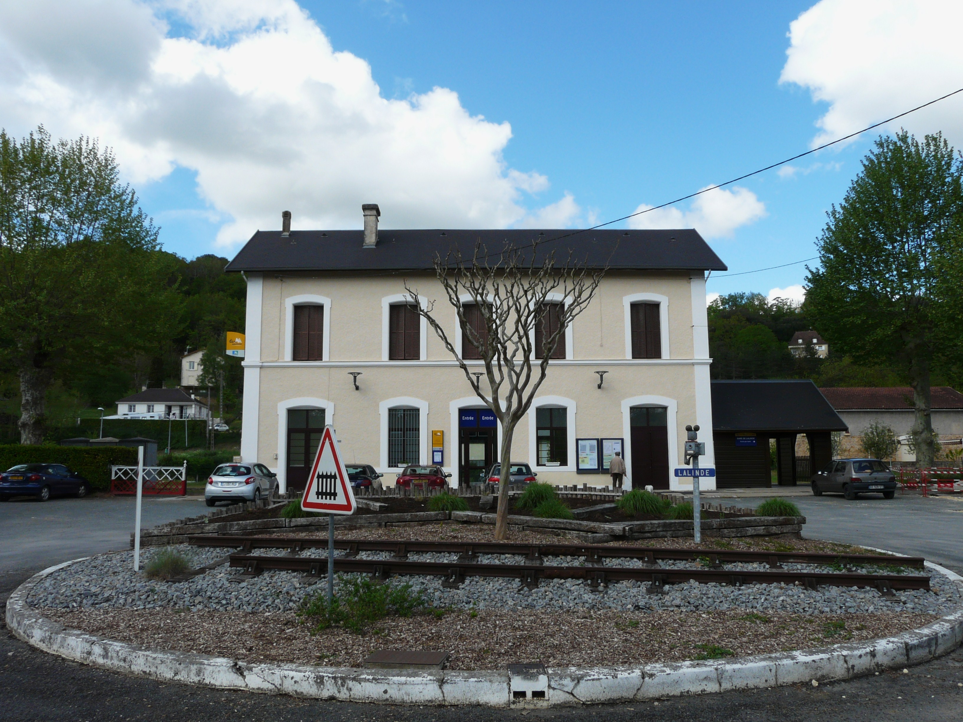 La gare de Lalinde, Dordogne, France.